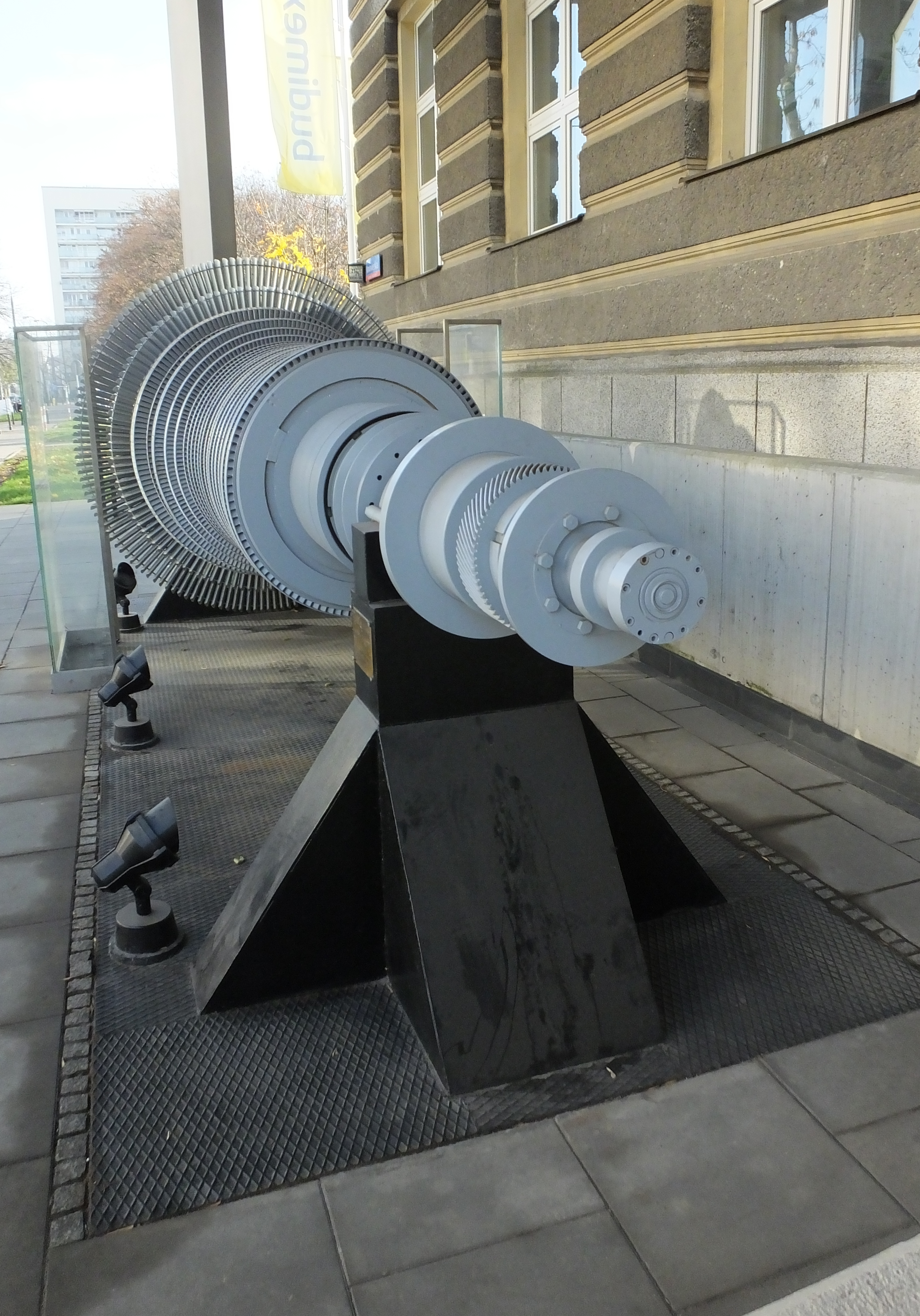 Wirnik parowej turbiny upustowo-kondensacyjnej TC 25 o mocy 25 MW eksploatowanej przez 40 lat w Elektrociepłowni Żerań. Zdemontowany w 2005 i przekazany Instytutowi Energetyki Cieplnej Politechniki Warszawskiej. Wystawiony przed siedzibą instytutu.